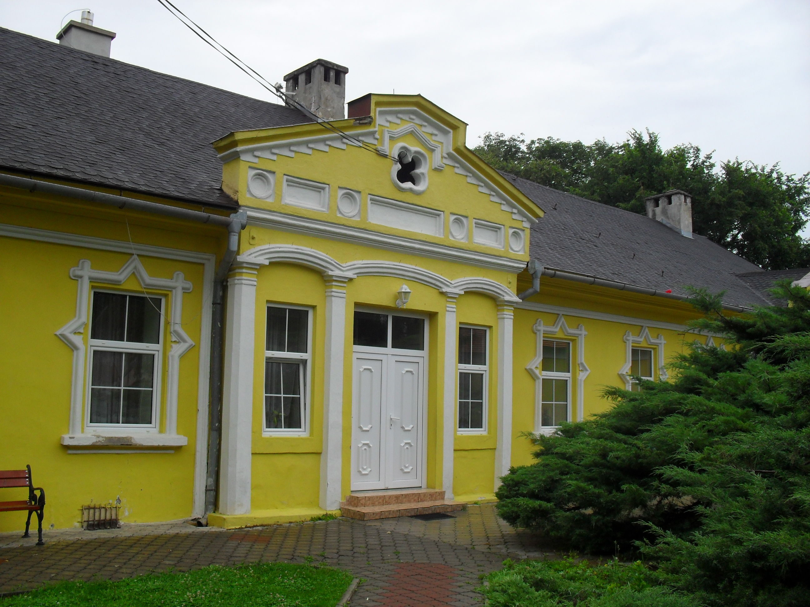 Tornalja - egykori Tornallyay-kúria (ma: gyermekotthon)